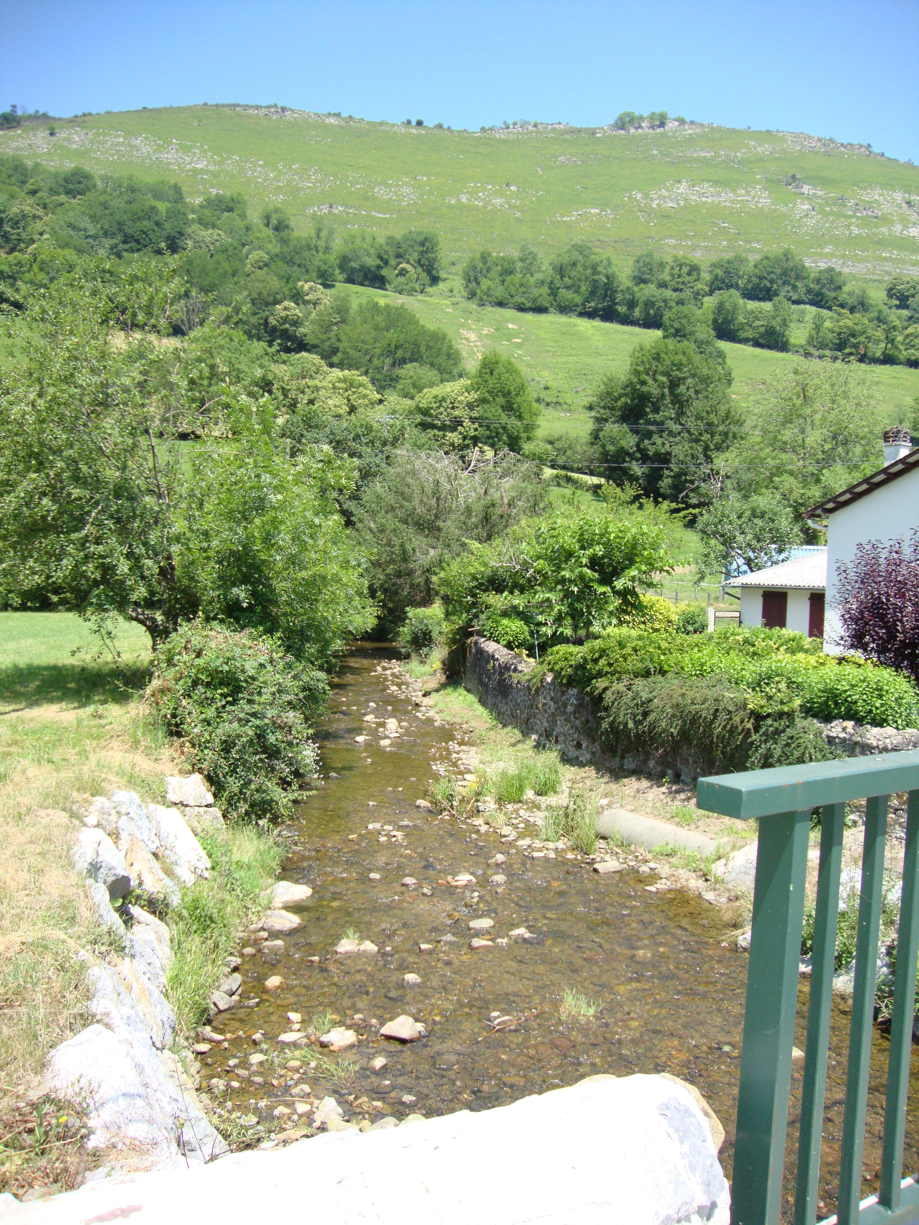 Haux (Pyr-Atl,Fr) Paysage avec ruisseau d'Appaniche (D 759 en aval de Haux; la vue est direction Montagne d'Ahargou).